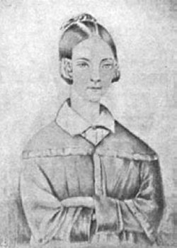 Narcyza Żmichowska (1819-1876) (Original text: Fotografie einer Zeichnung)